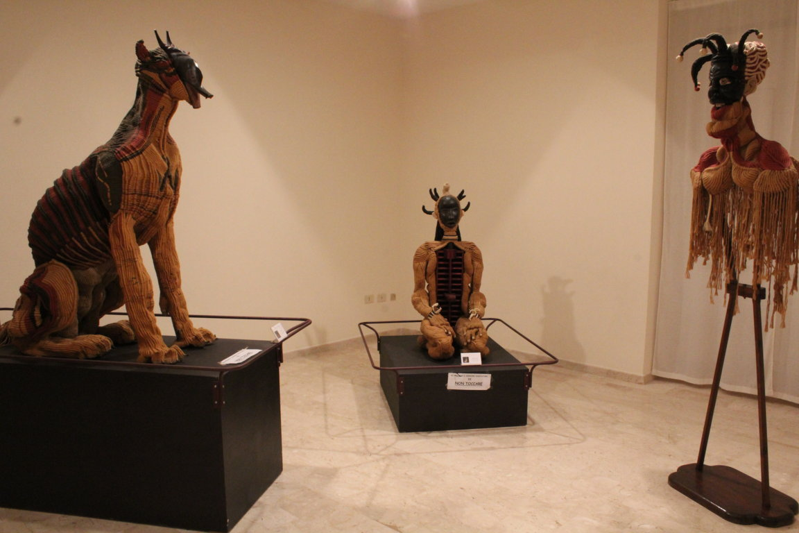 Sculture tessili dell'artista francese Sylvie Clavel